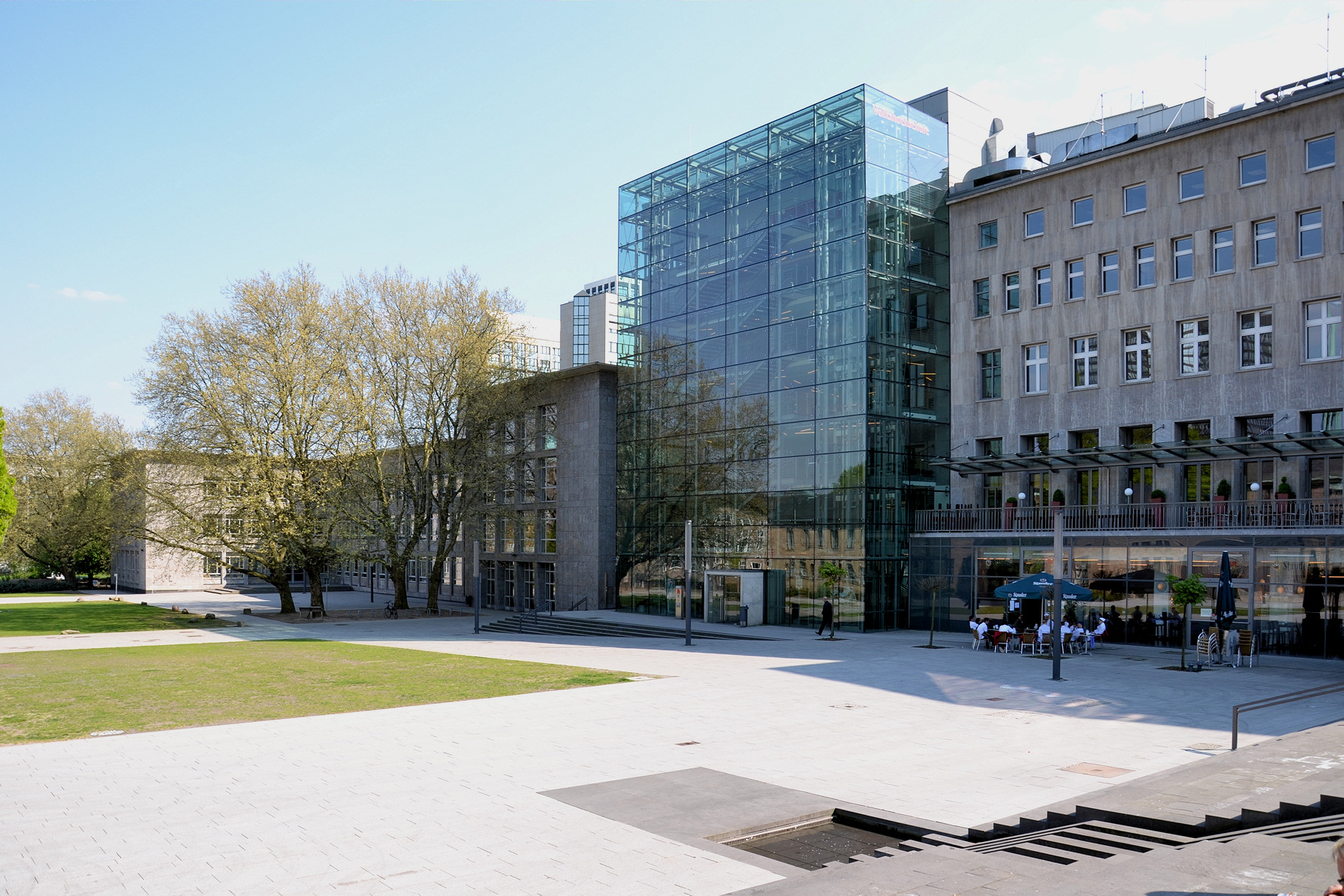 Burgplatz im Essener Stadtkern